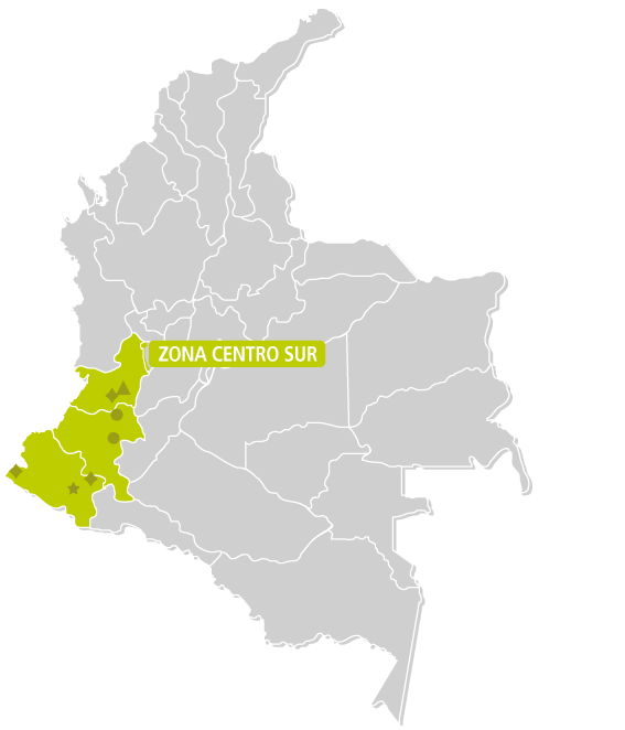 Centro Sur